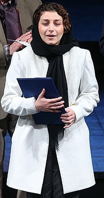 پریسا پیرزاده اختتامیه سی‌وسومین جشنواره موسیقی فجر ۳۰ دی ۱۳۹۶